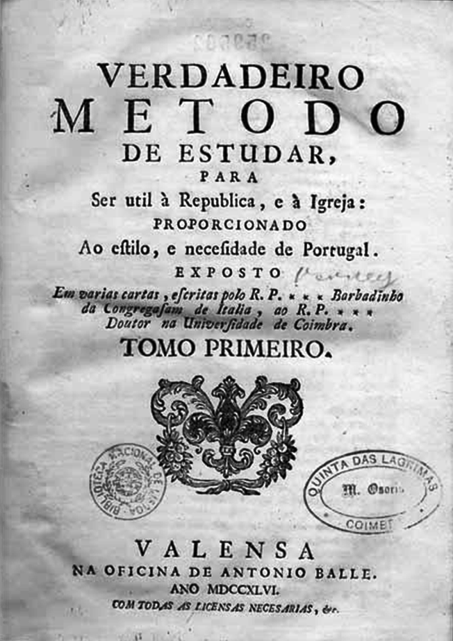 Fac-símile de "Verdadeiro Método de Estudar", de Luís António Verney (Valença, 1746).